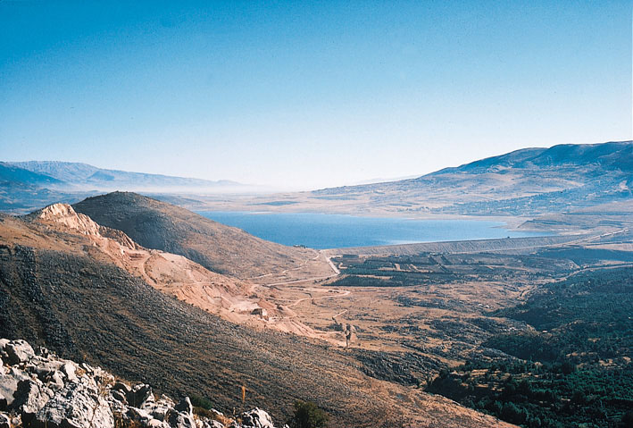 Vue vers le nord sur le lac Qaraoun, ou lac Litani, dans la Bekaa, Liban, depuis les collines de Machghara